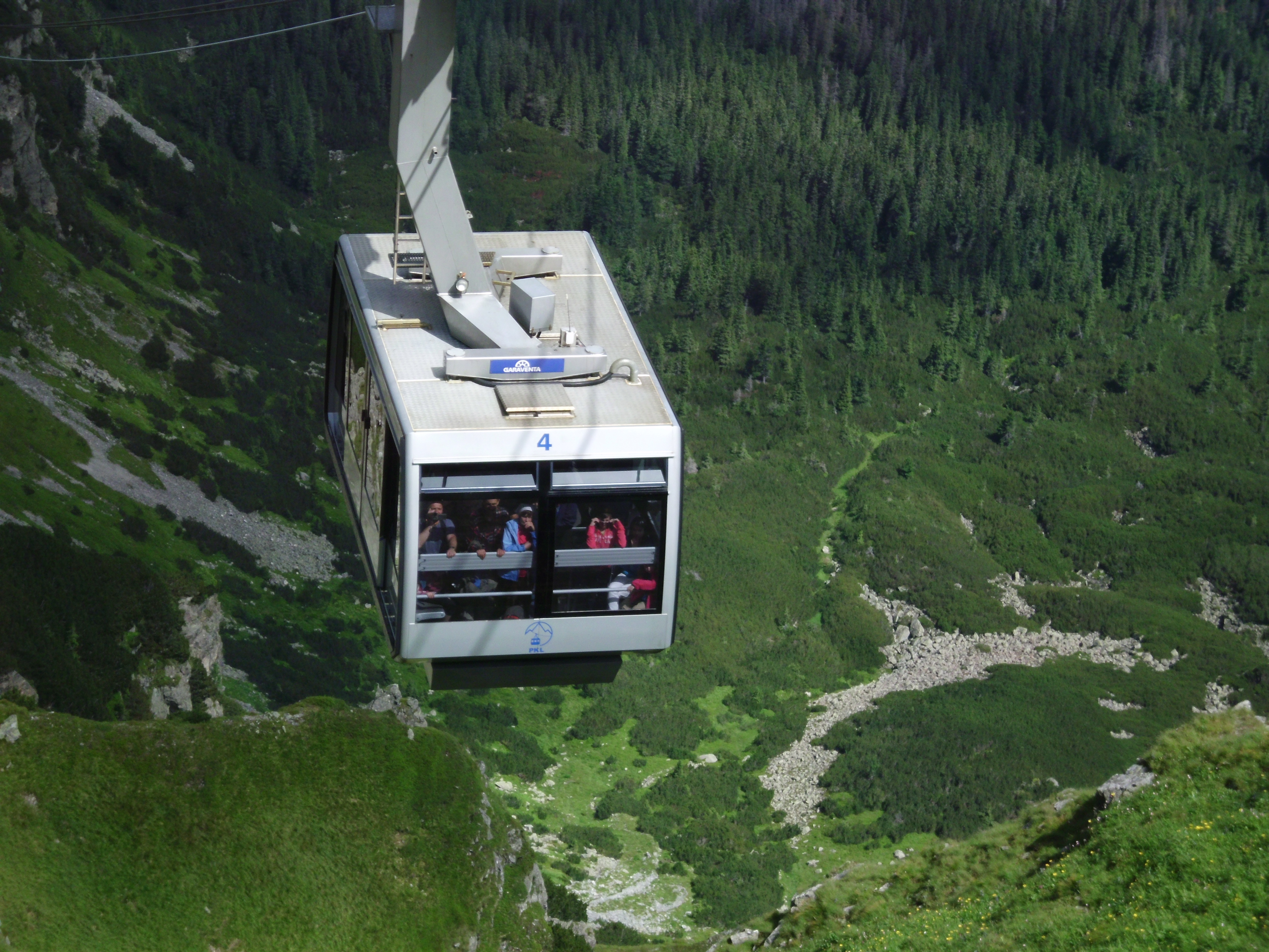 Kolej linowa na Kasprowy Wierch